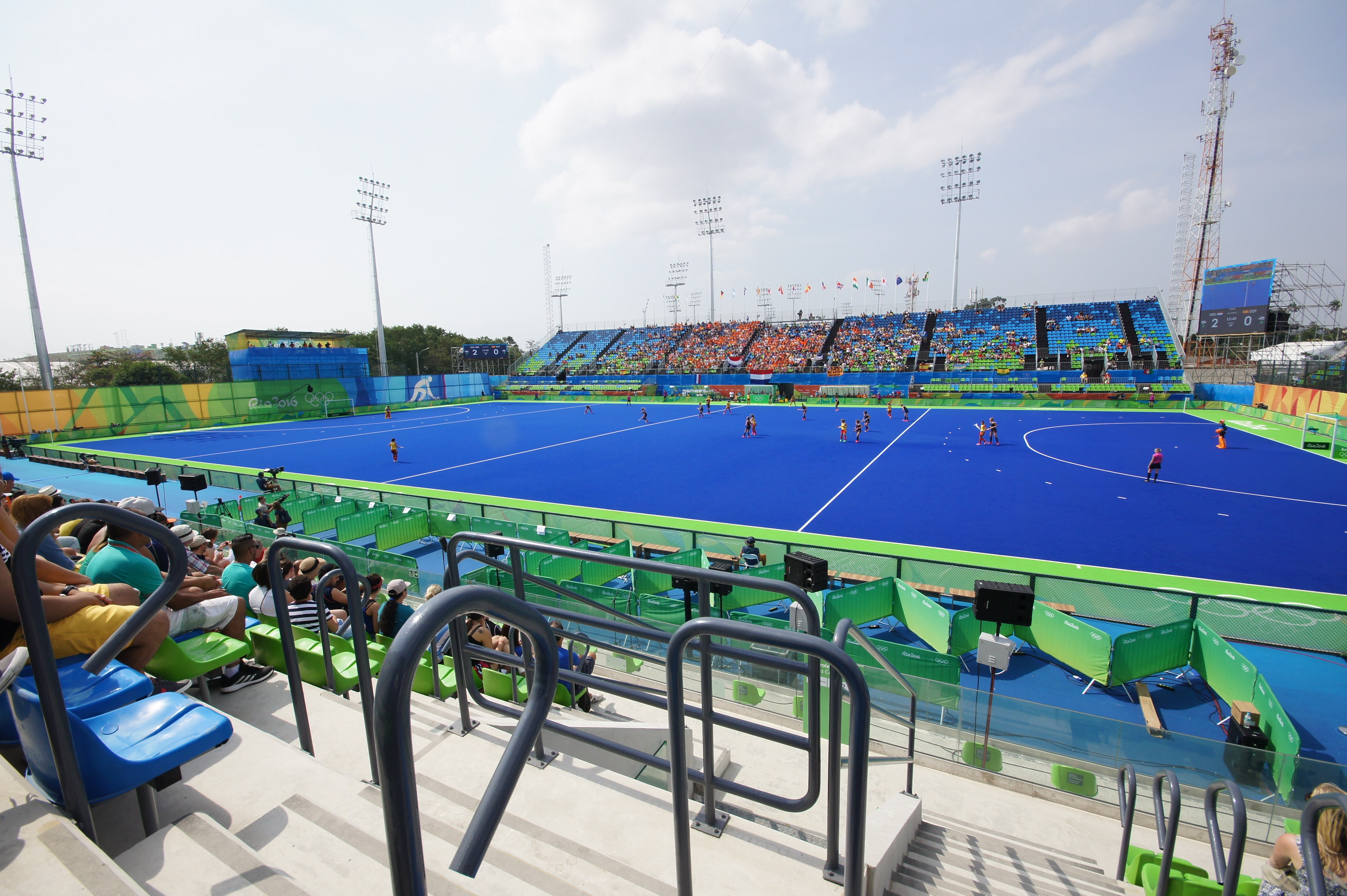 Rio 2016.Hóquei na grama. Feminino. Holanda x Espanha. 34